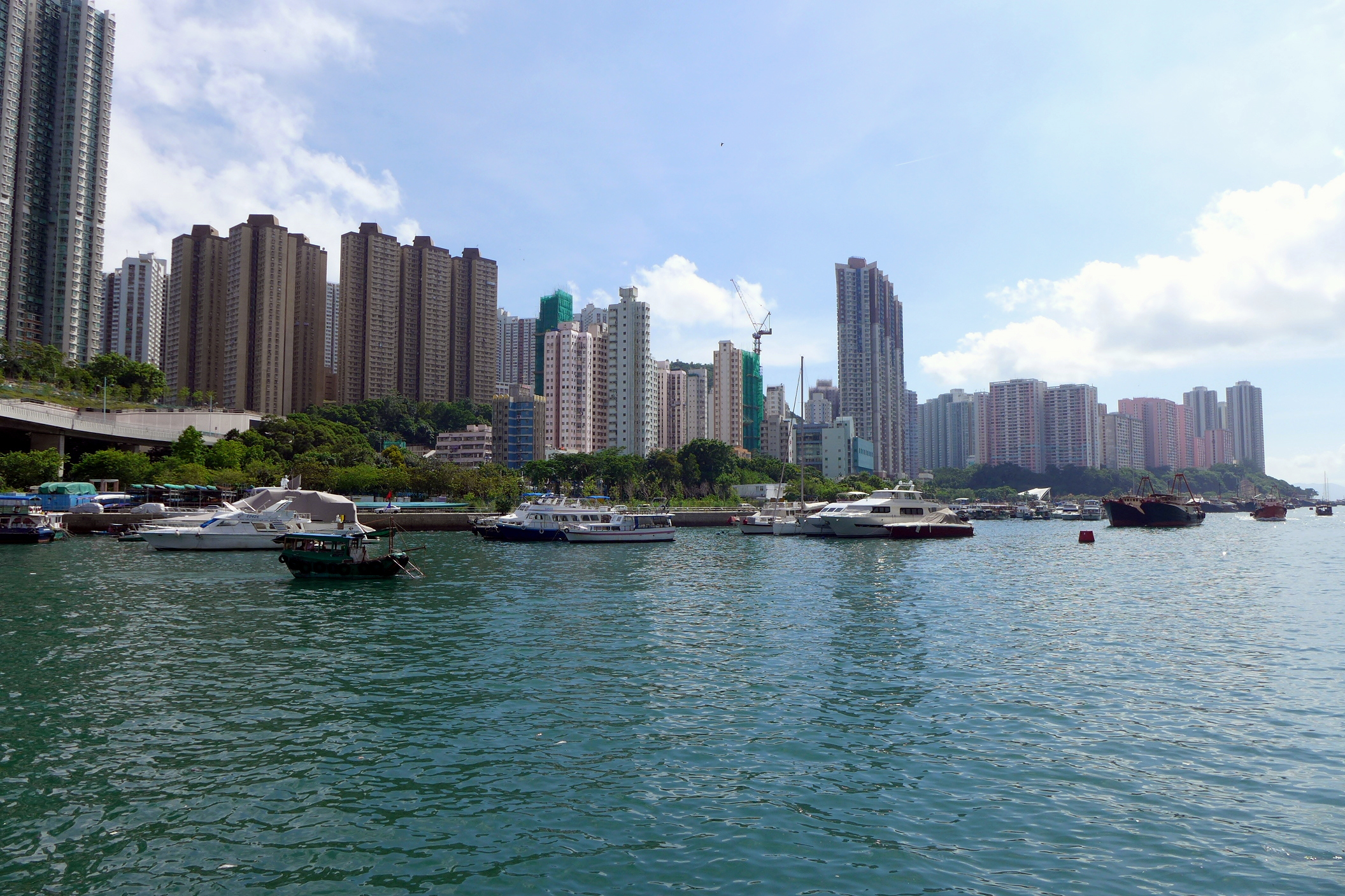 Shek Pai Wan